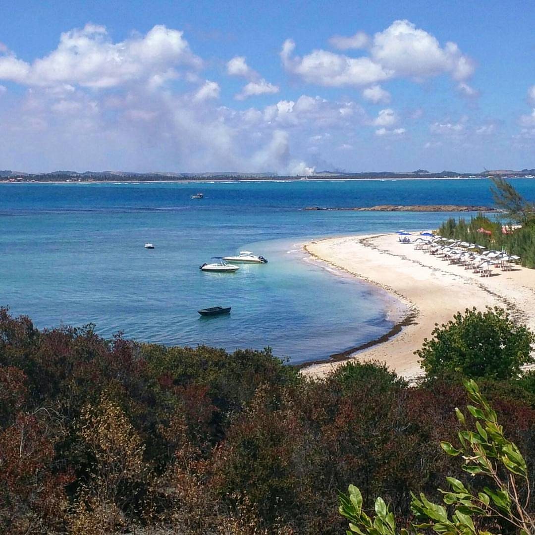 Ilha de Santo Aleixo (Sirinhaém, Pernambuco, Brasil).